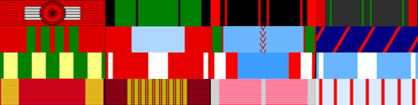 assemblage des décorations du LC E Fossey-François réalisé par moi même.